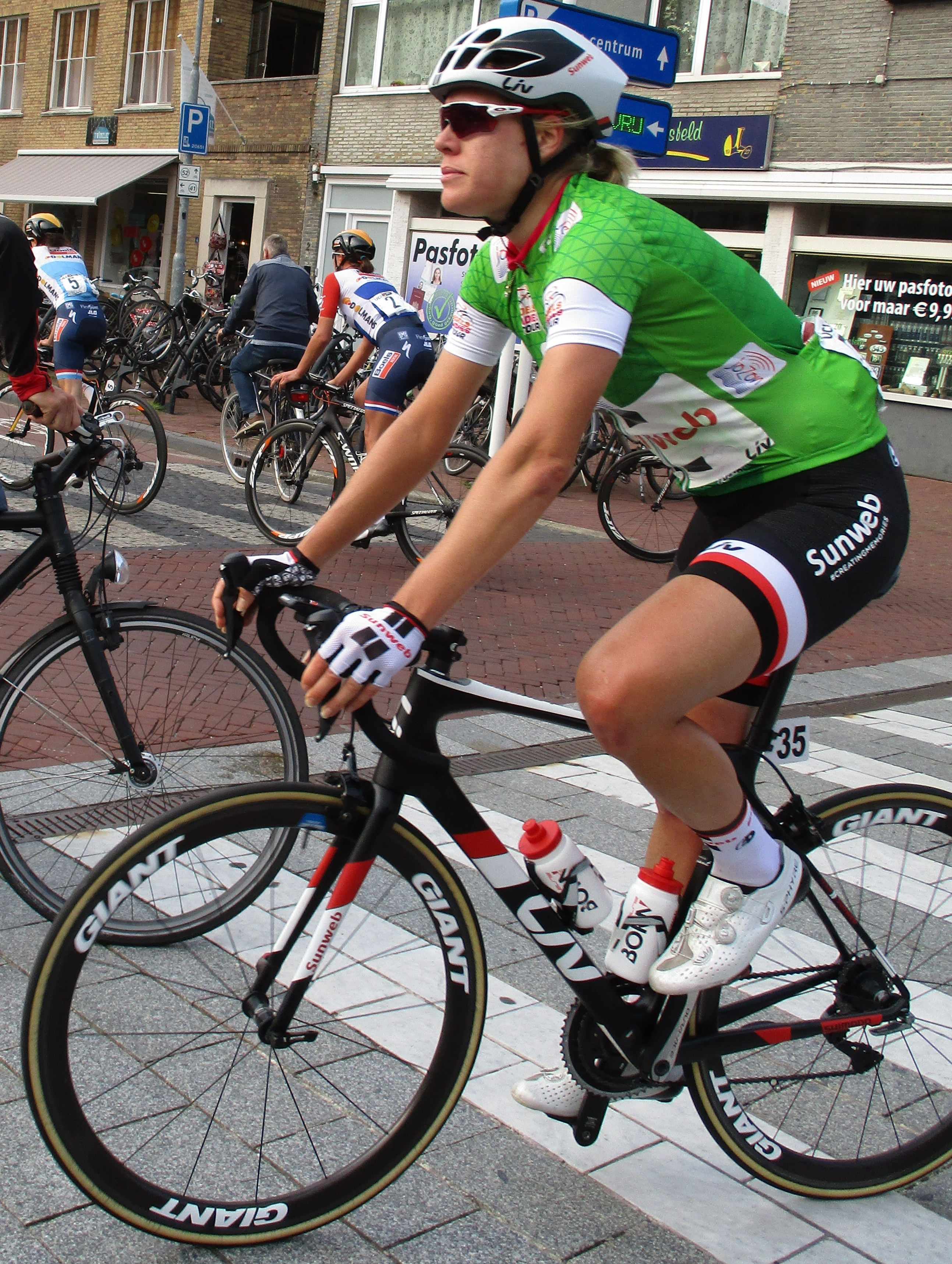 4e etappe van de Boels Ladies Tour 2017 door Noord-Limburg, finish in Weert.